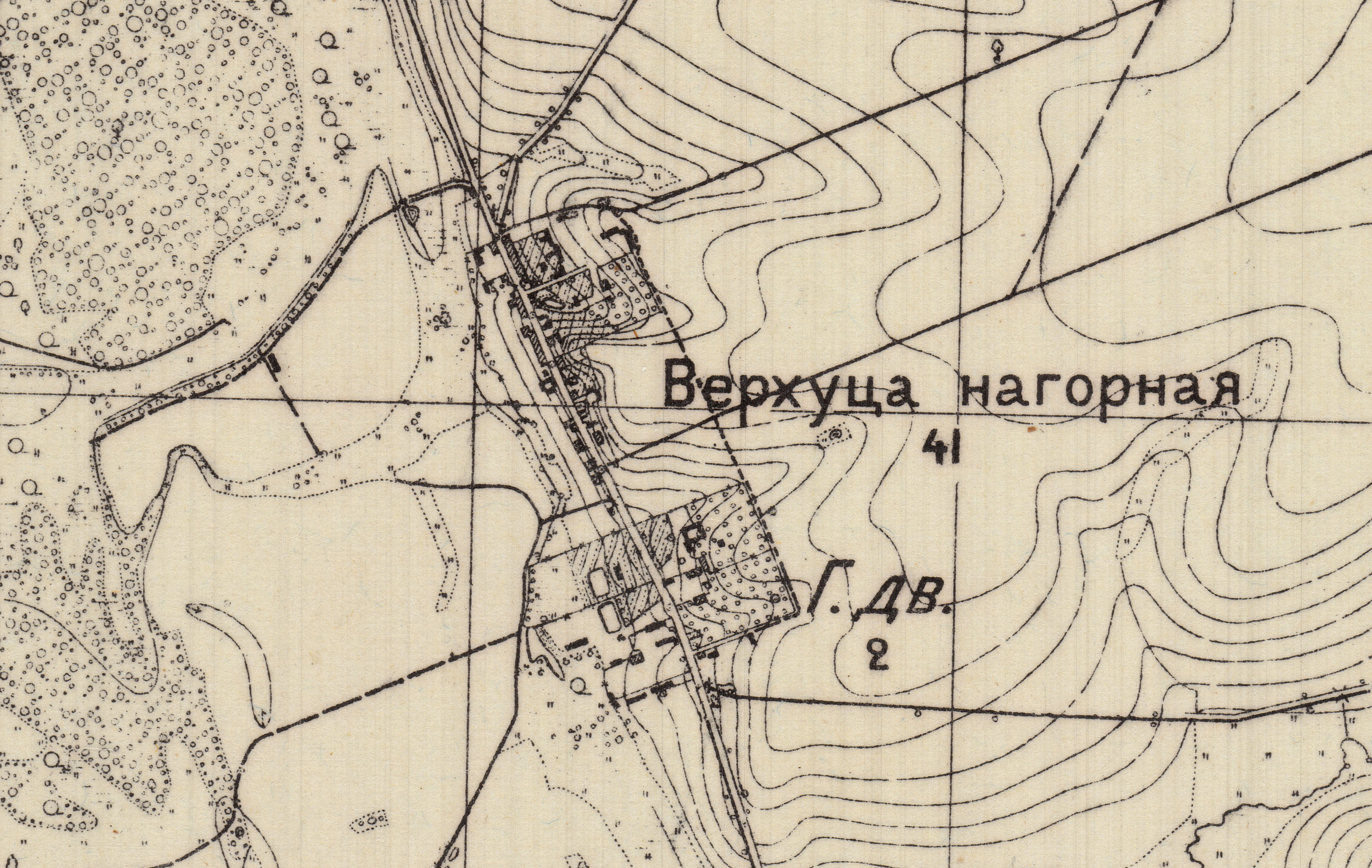 Wierzchuca Nagórna na rosyjskiej mapie półwiorstowej z 1883r. (kopia z 1940r.)